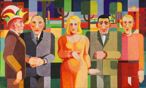 Auf dem Bild: Sänger Willi Ostermann, Oberbürgermeister Konrad Adenauer, Soubrette Trude Alex, Boxer Hein Domgörgen, der Künstler Heinrich Hoerle selbst